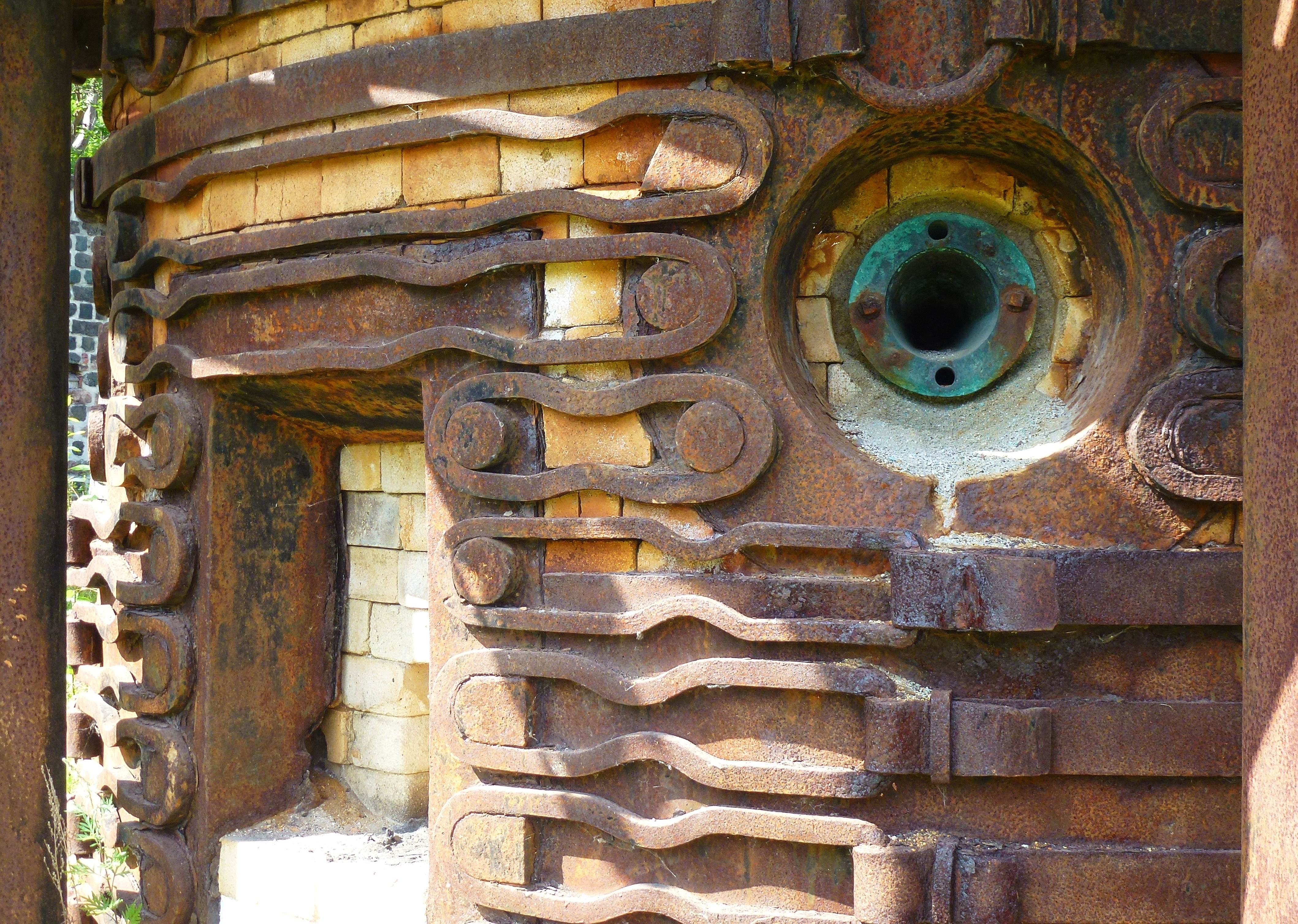 Högfors bruk, masugn detalj